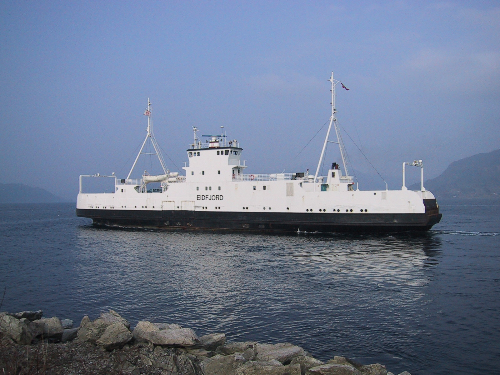 M/F Bjørgvin, later M/F Eidfjord. Build 1975.